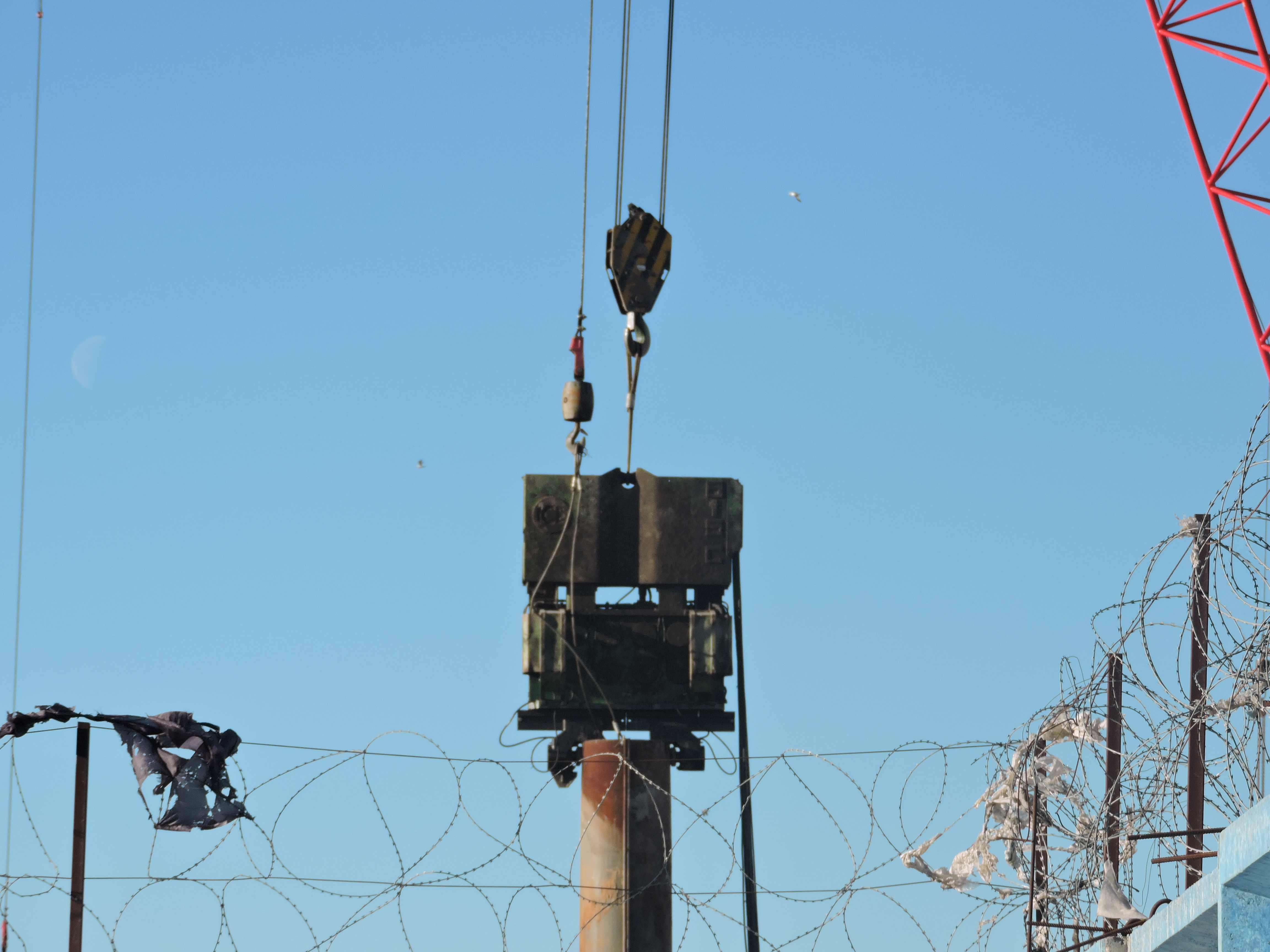 Вибропогружатель